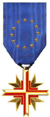 Croix du combattant de l’Europe